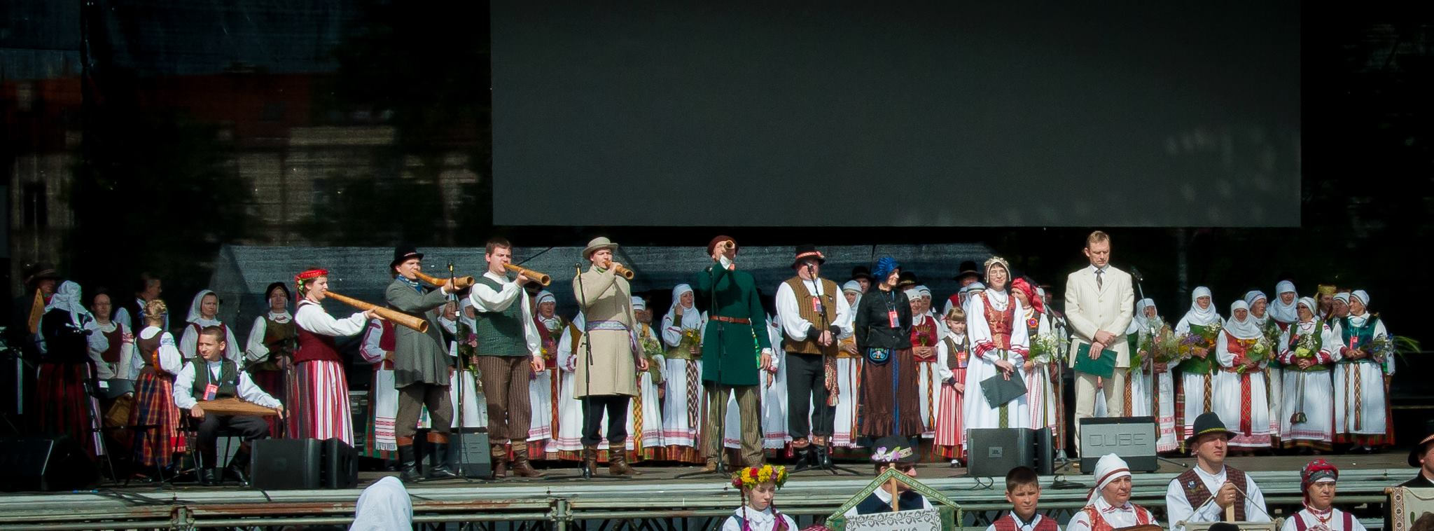 „Linago“ ragų pūtėjai Dainų šventės scenoje